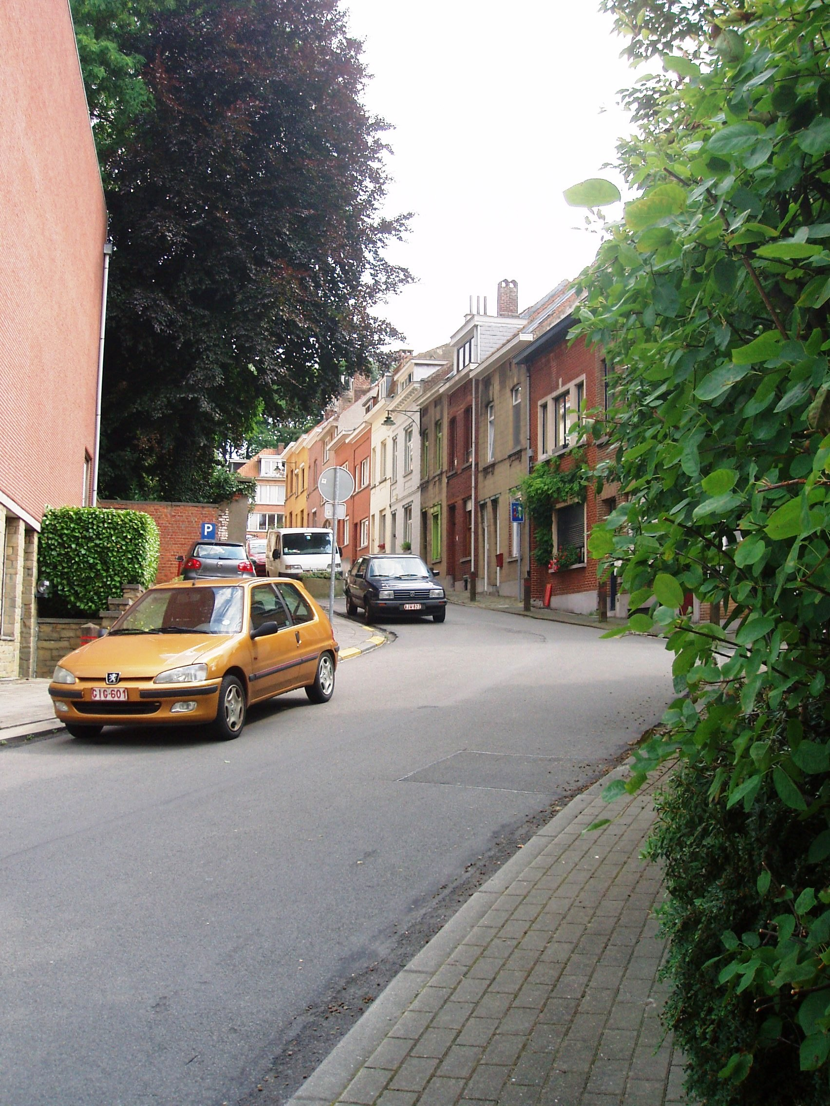 rue du Villageois Auderghem Belgium